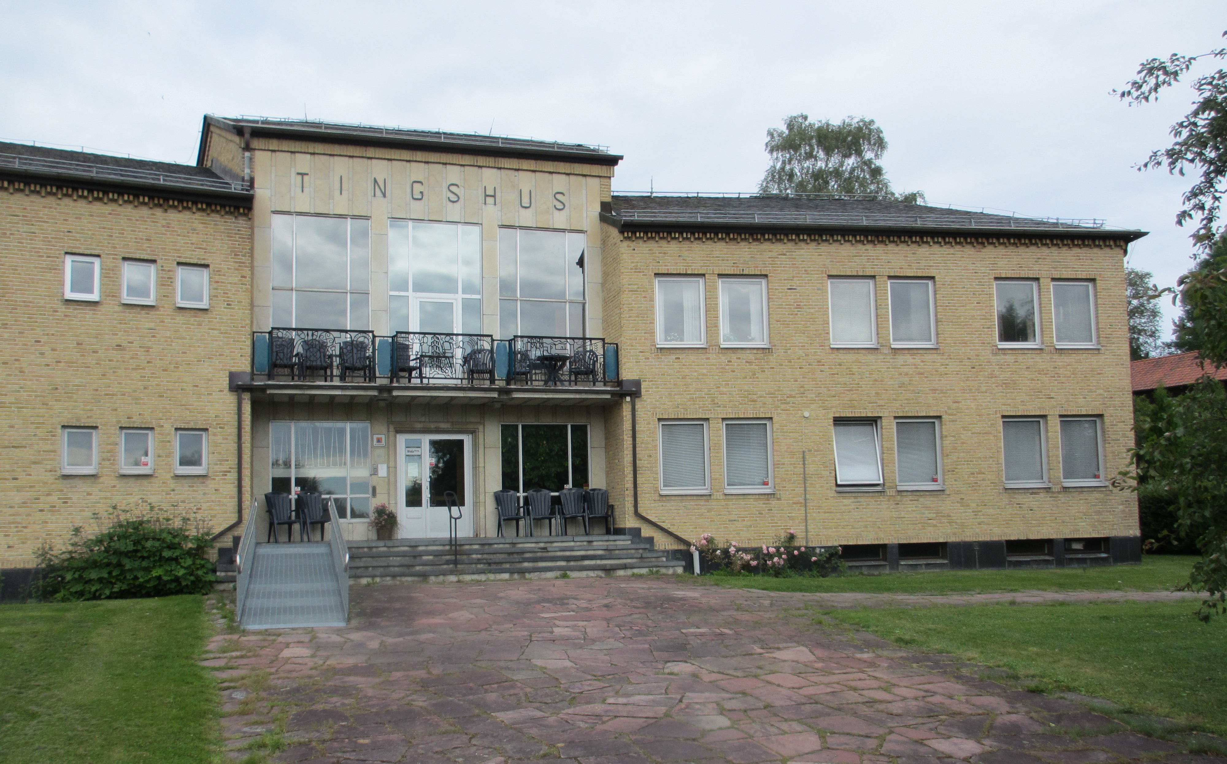 Bollnäs tingshus, Södra Kyrkvägen 3 (1953), arkitekt: Heino Krabu.